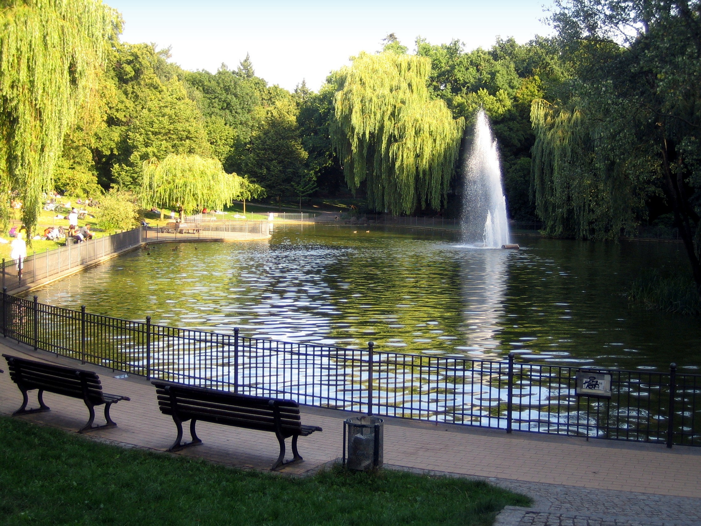 Volkspark Friedrichshain in Berlin. Großer Teich mit Fontäne.